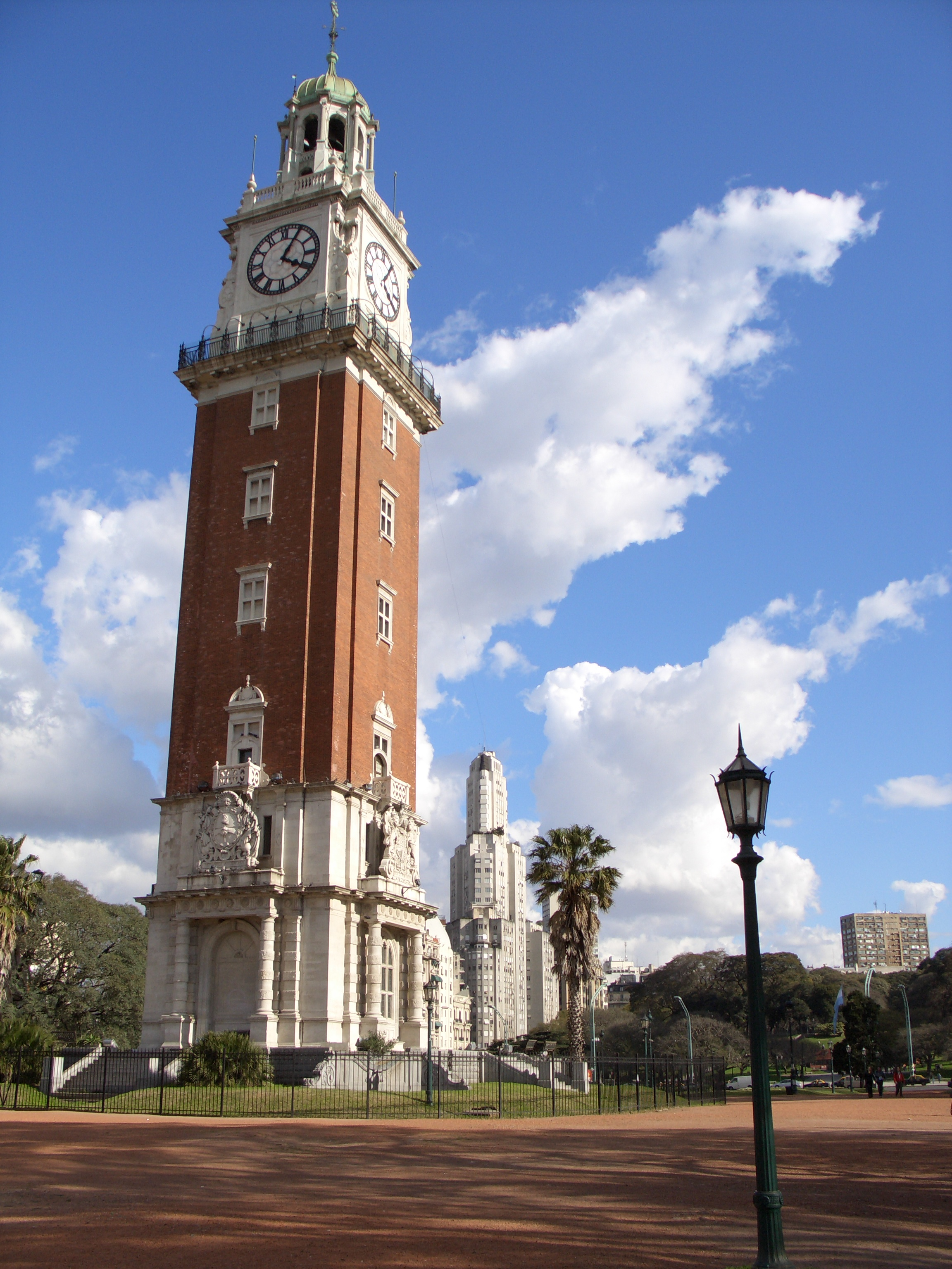 Torre Monumental, Buenos Aires, Argentina